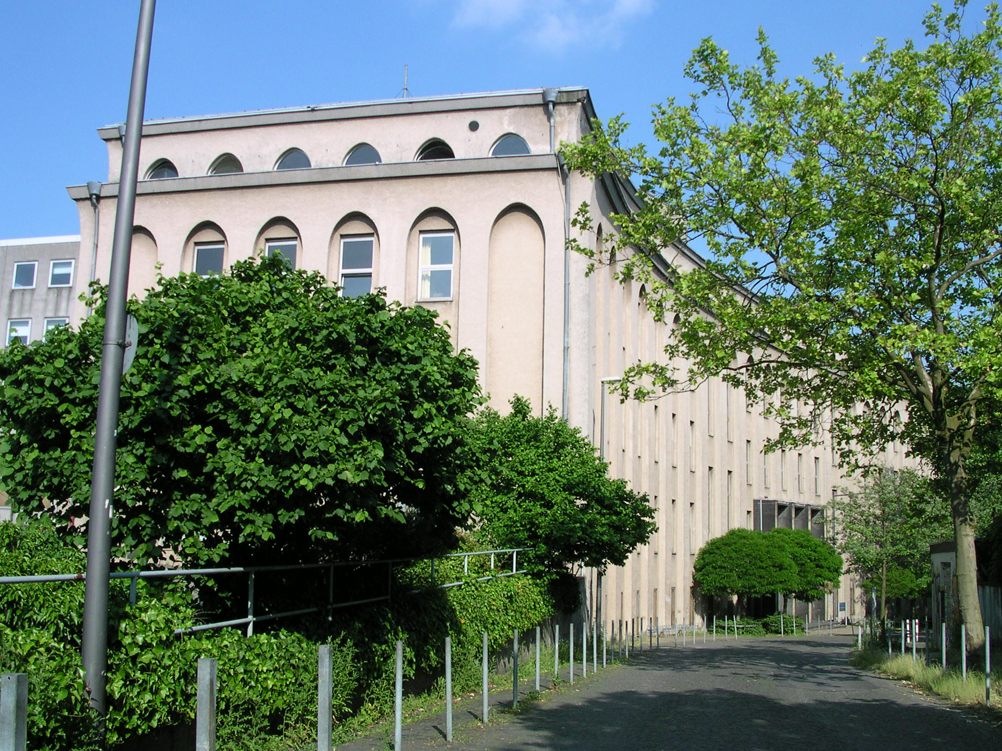 Aachen, Rogowski-Institut der RWTH Aachen an der Schinkelstraße, benannt nach dem Initiator Walter Rogowski (7.5.1881 - 10.3.1947), seit 1920 Ordinarius für allgemeine und theoretische Elektrotechnik an der TH, fertiggestellt 1929